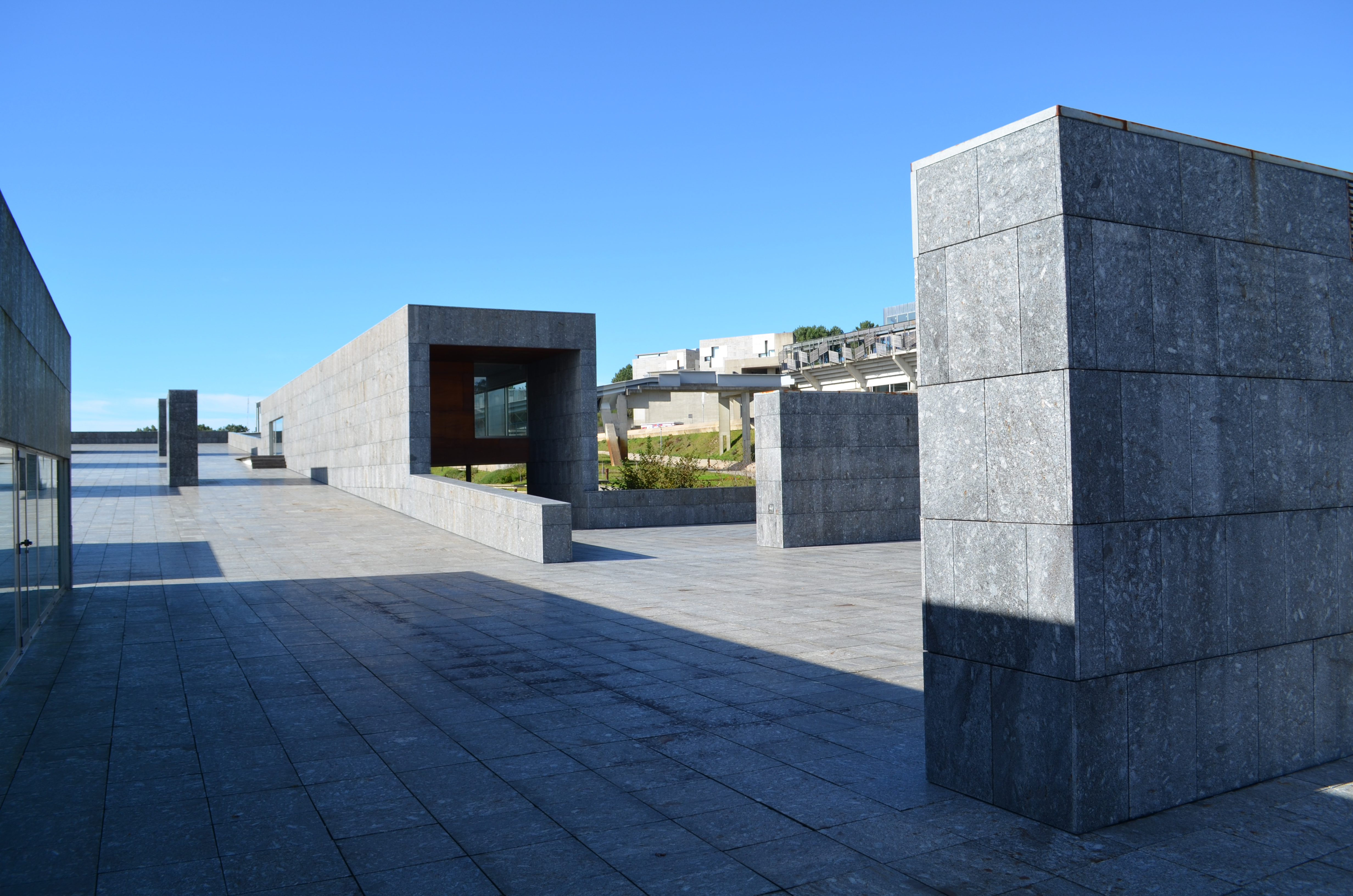 Bib_Central_-_Uni_Vigo_-_Vigo_-_Spain